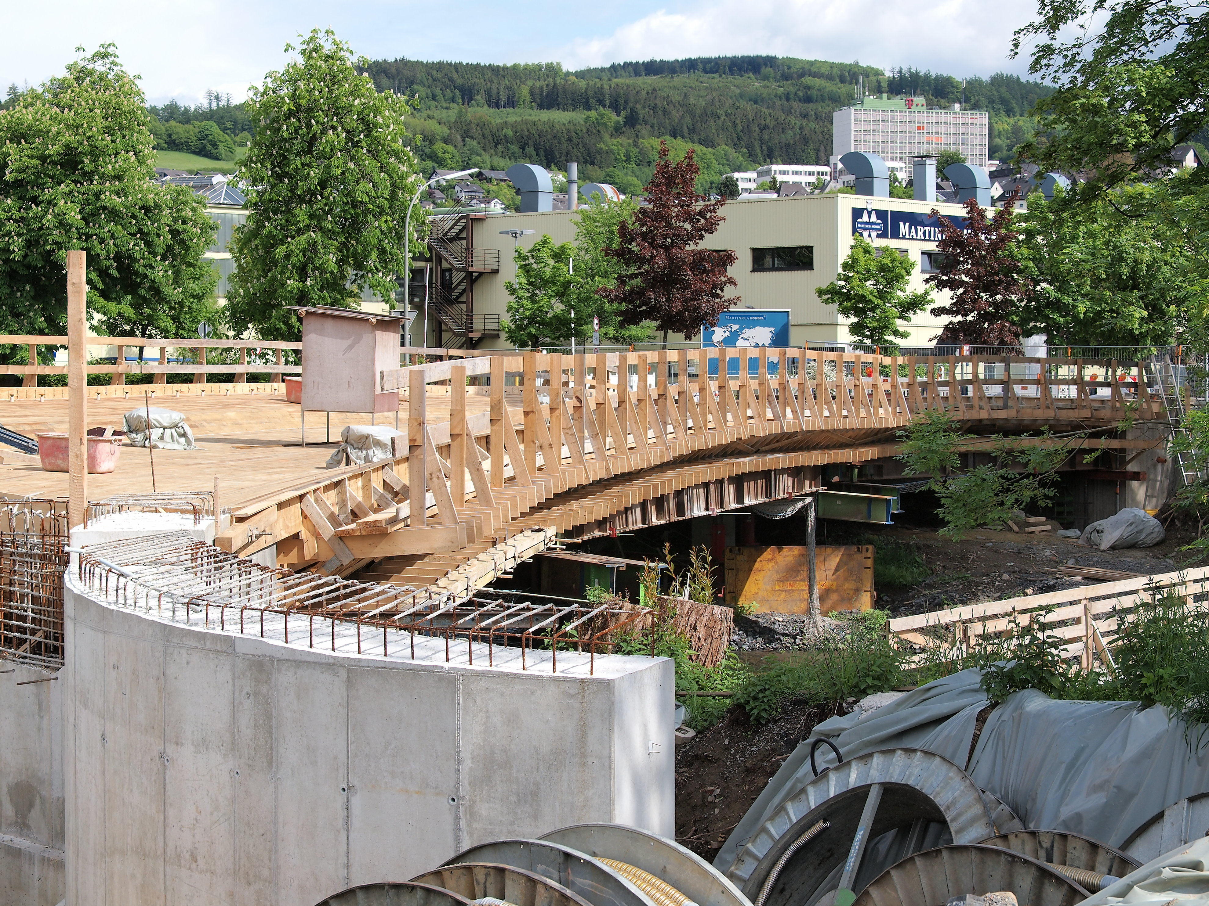 Meschede Neubau der Johannesbrücke über die Ruhr, Baustelle einer Straßenbrücke